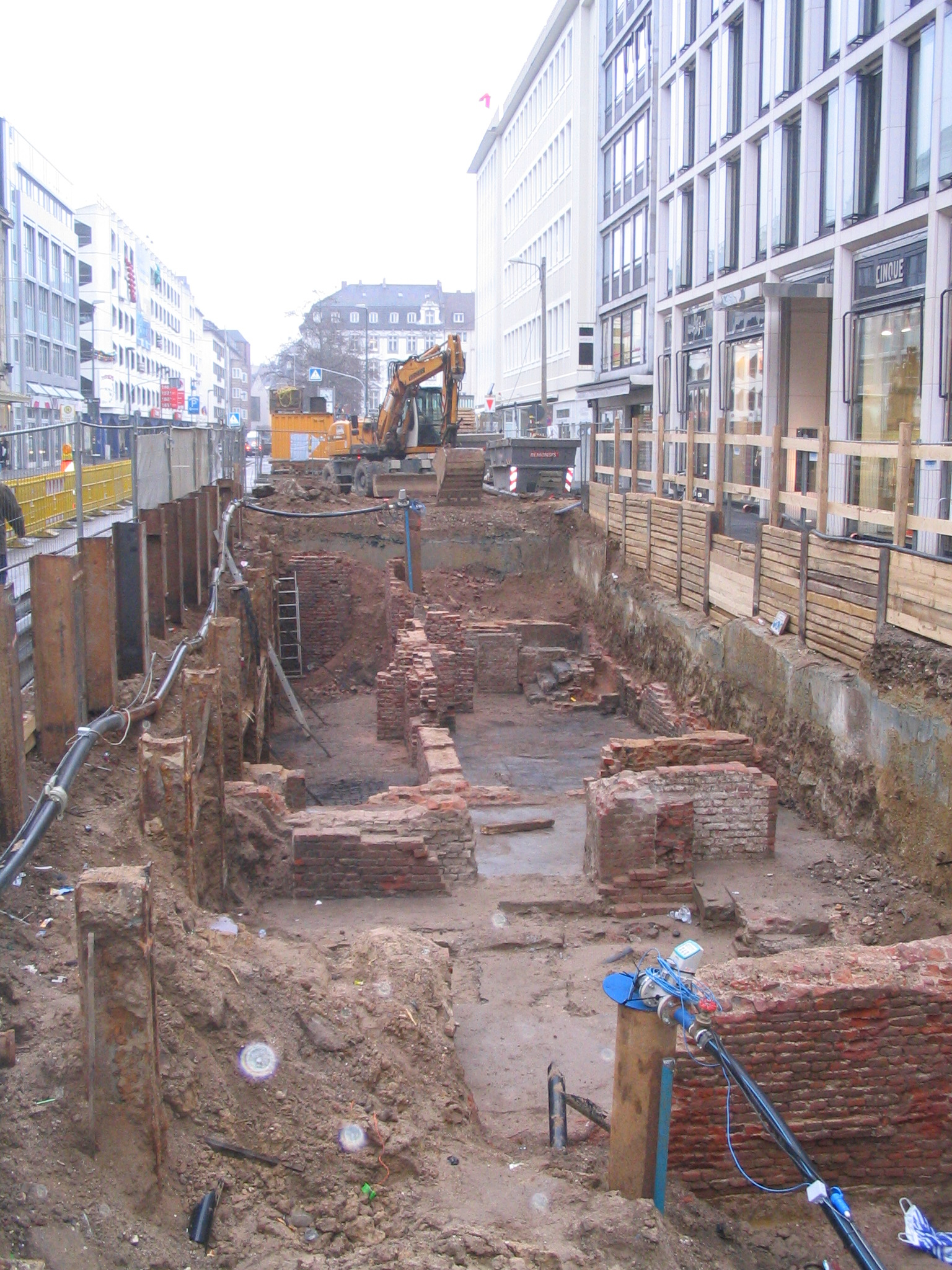 Düsseldorf, Ausgrabung bei Bauarbeiten neben der Kreuzung Kasernenstraße Ecke Benrather Straße, Blickrichtung Rhein (West), Februar 2012